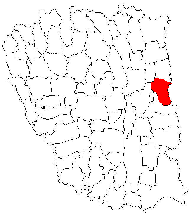 Categorie:Hărţi ale judeţului Galaţi